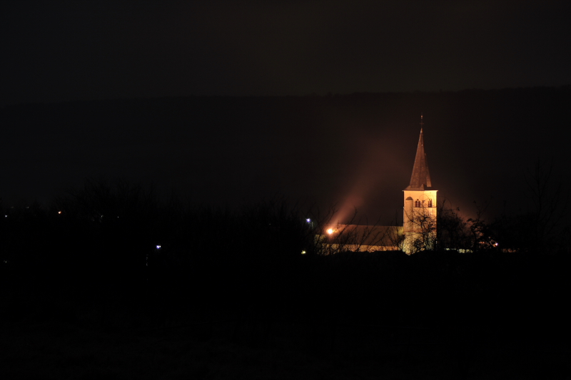 Eglise de Lay Saint Christophe de nuit